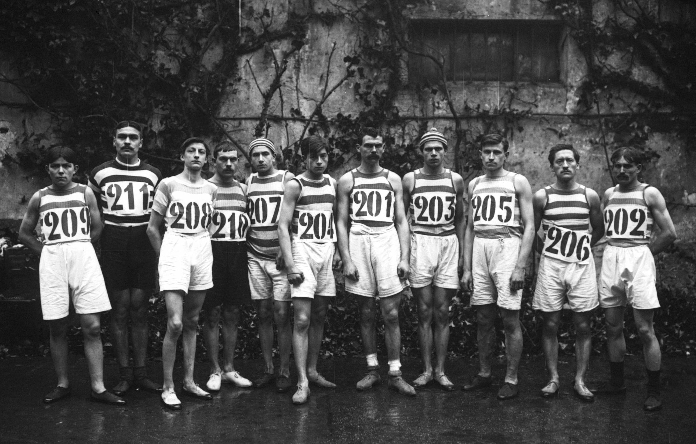 Photo de l'équipe du Cercle pédestre quevillais en 1914.